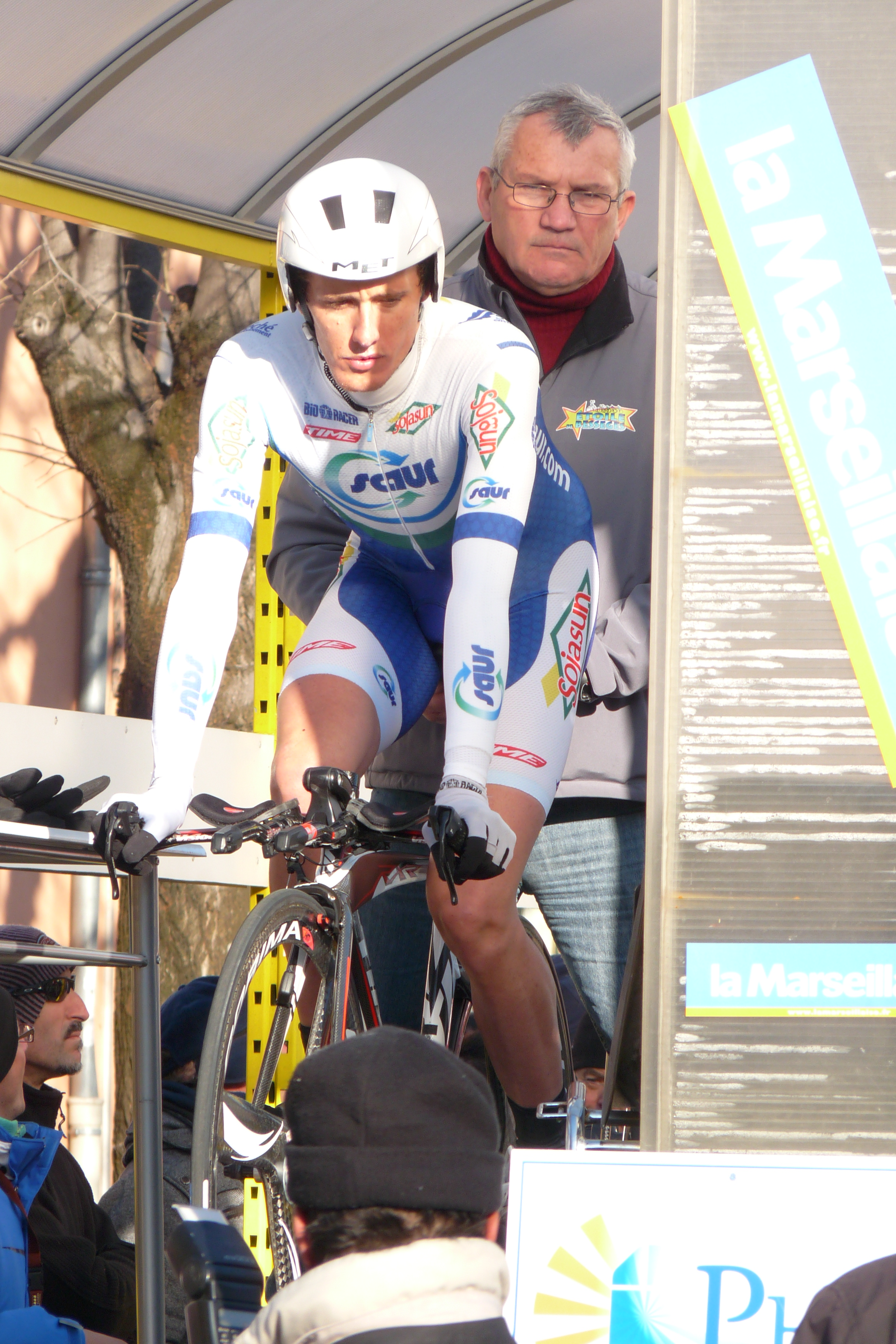 Jérôme Coppel au départ du contre la montre, dernière étape de l'Étoile de Bessèges 2012